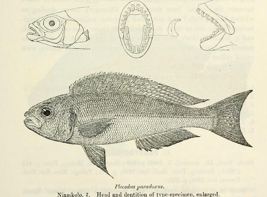 Plecodus paradoxus